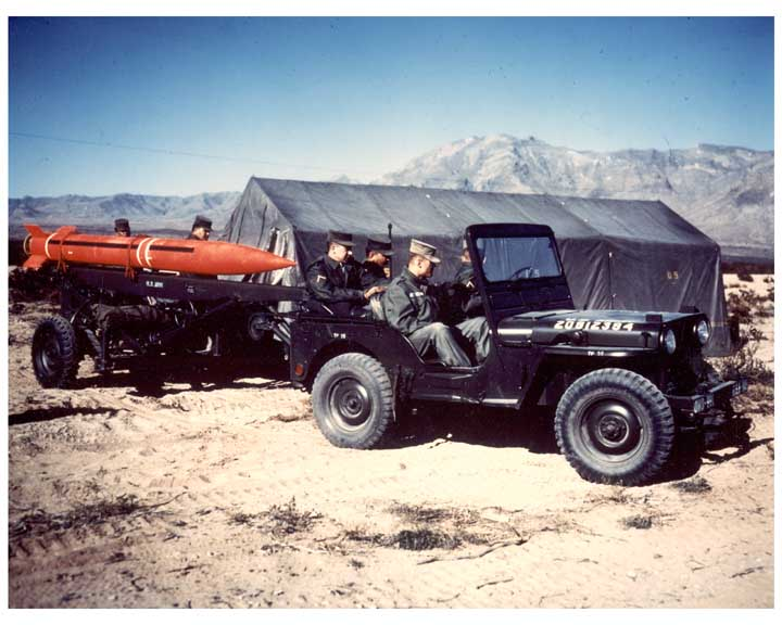 MGR-3 Little John (XM51)